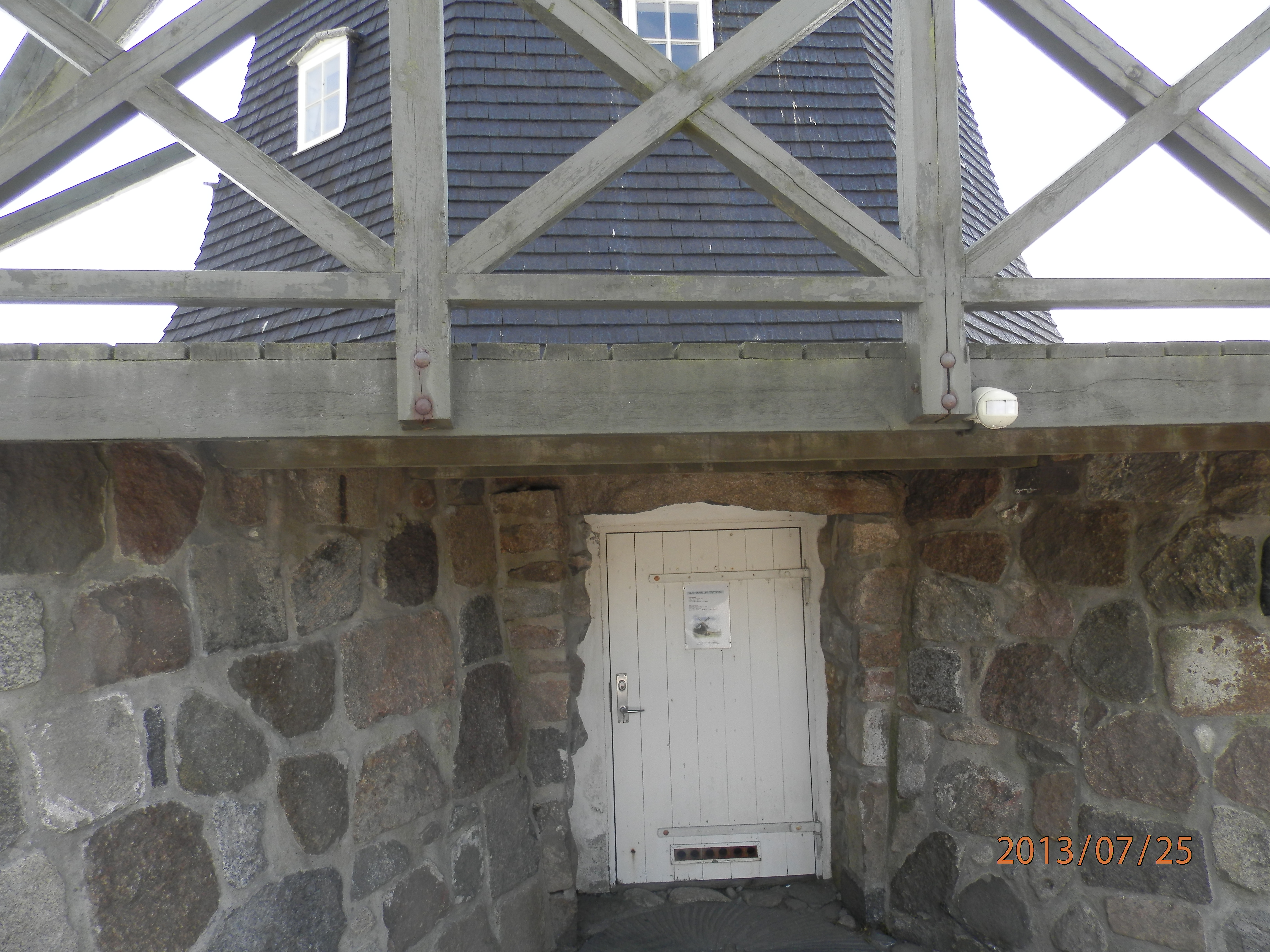 Heltborg Mølle, beliggende nær Hurup, Sydthy, Danmark. Bemærk undermøllen i kampesten og galleriet over denne.